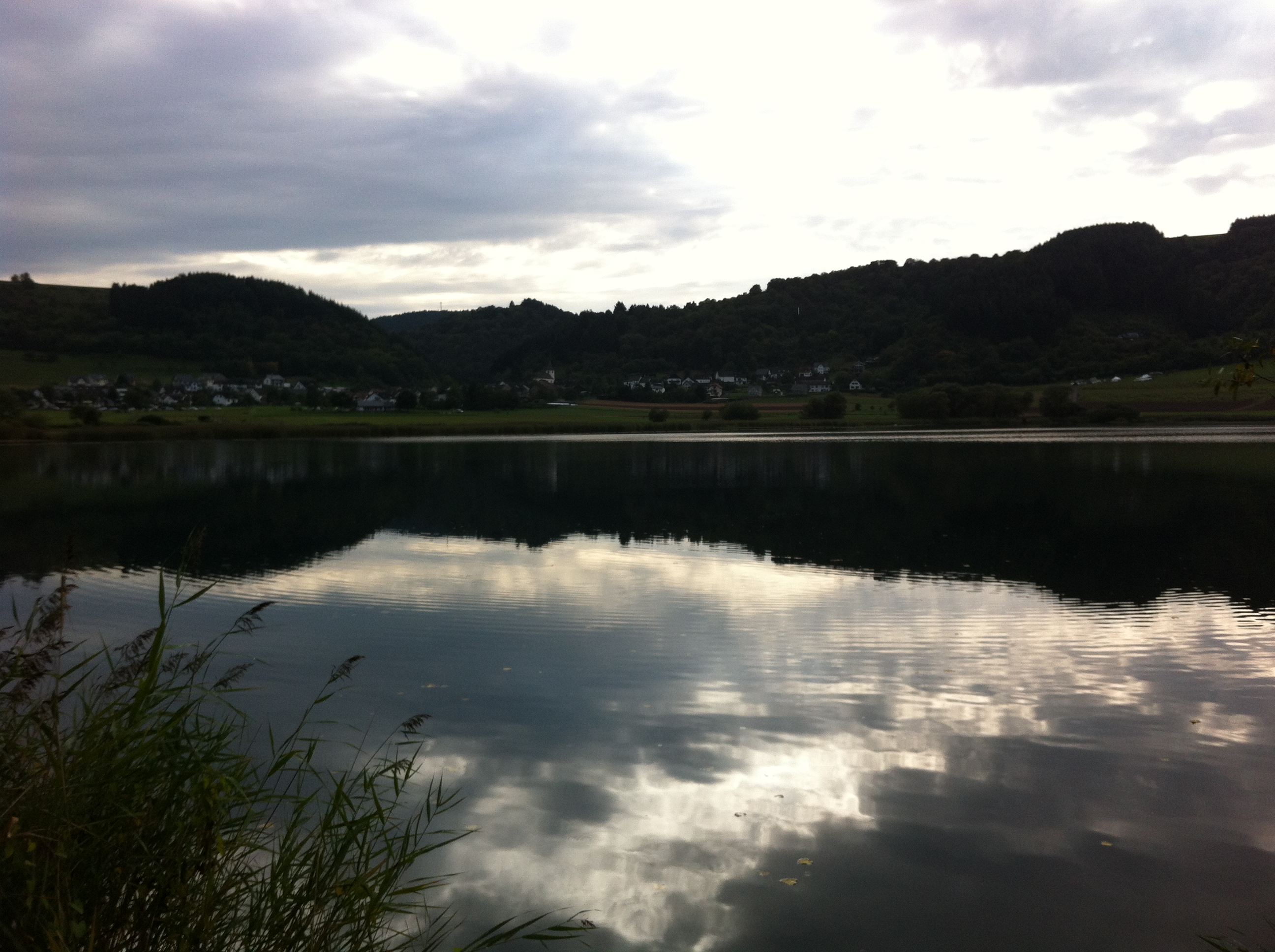 Blick zum Westufer